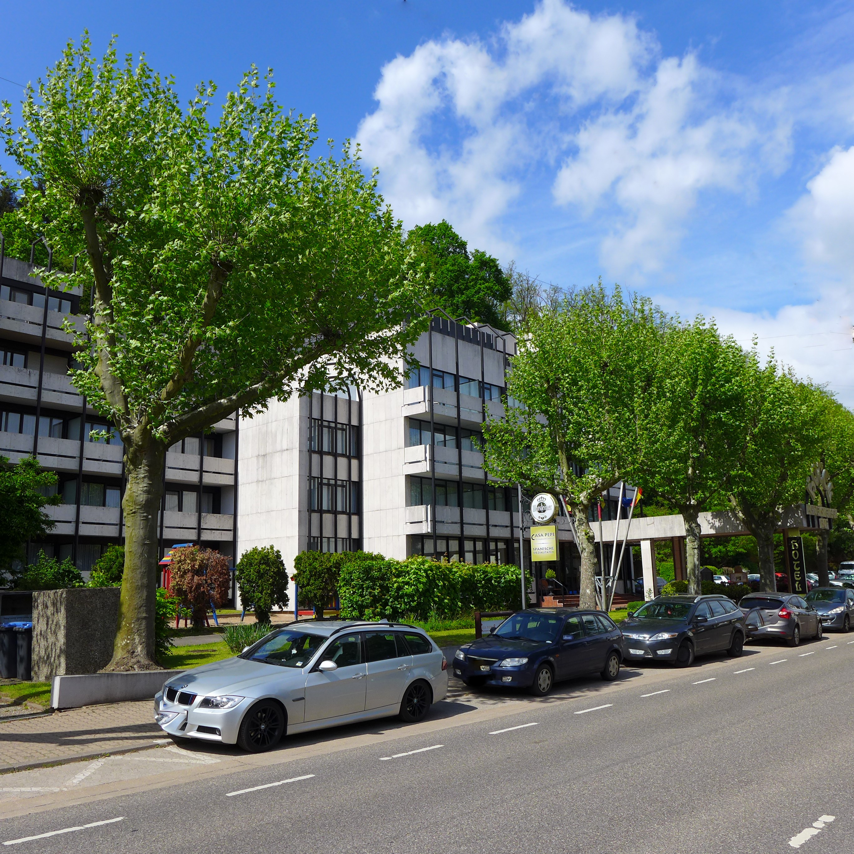 Diefflen, Wohn- und Hotelanlage "Bawelsberger Hof" der 1980er Jahre am Ort der früheren Volksschule in der Dillinger Straße